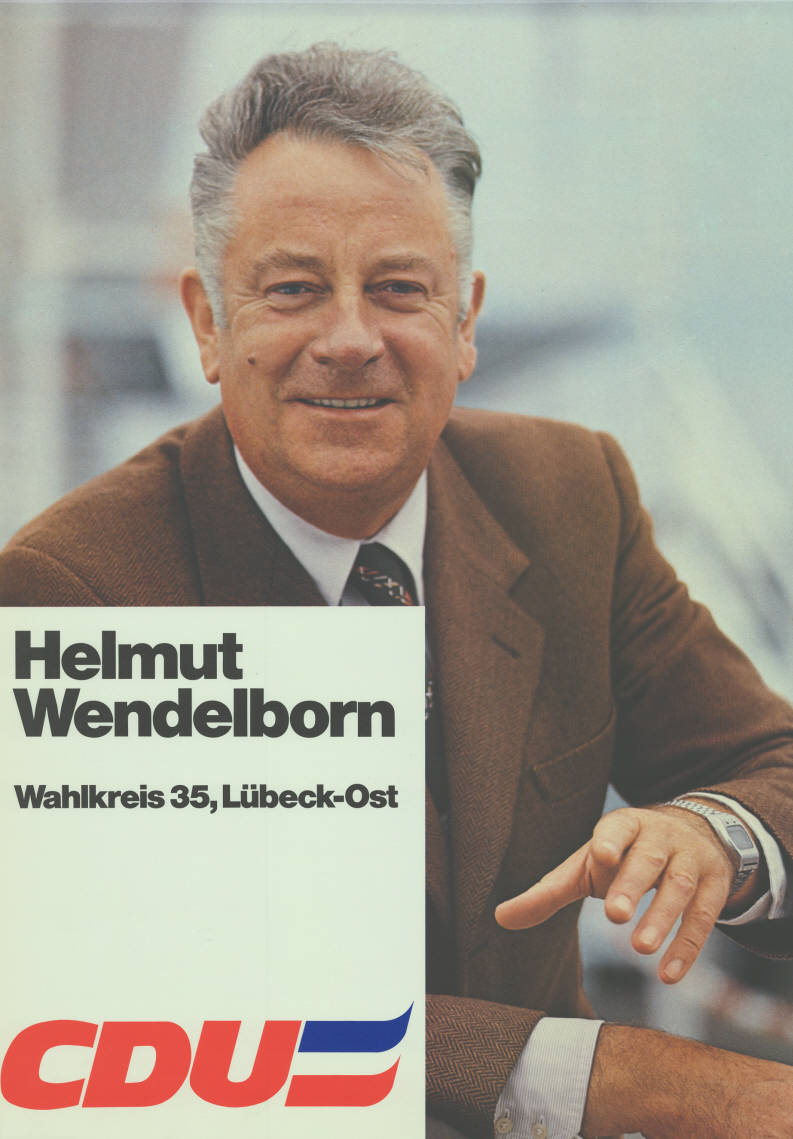 Helmut Wendelborn Wahlkreis 35, Lübeck-Ost CDU Abbildung: Foto Plakatart: Kandidaten-/Personenplakat mit Porträt Auftraggeber: Verantw.: CDU Schleswig-Holstein Objekt-Signatur: 10-012 : 440 Bestand: Landtagswahlplakate Schleswig-Holstein (10-012) GliederungBestand10-18: Landtagswahlplakate Schleswig-Holstein (10-012) » Landtagswahl am 29.4.1979 » Kandidatenplakate Lizenz: KAS/ACDP 10-012 : 440 CC-BY-SA 3.0 DE